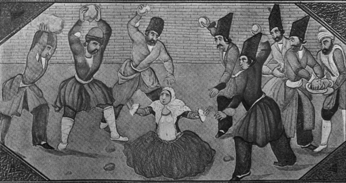 Megkövezés